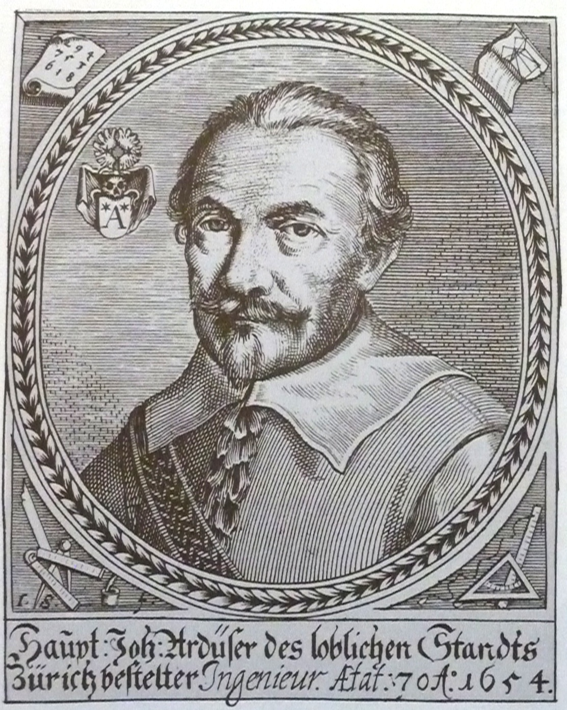 Johannes Ardüser Radierung 1654